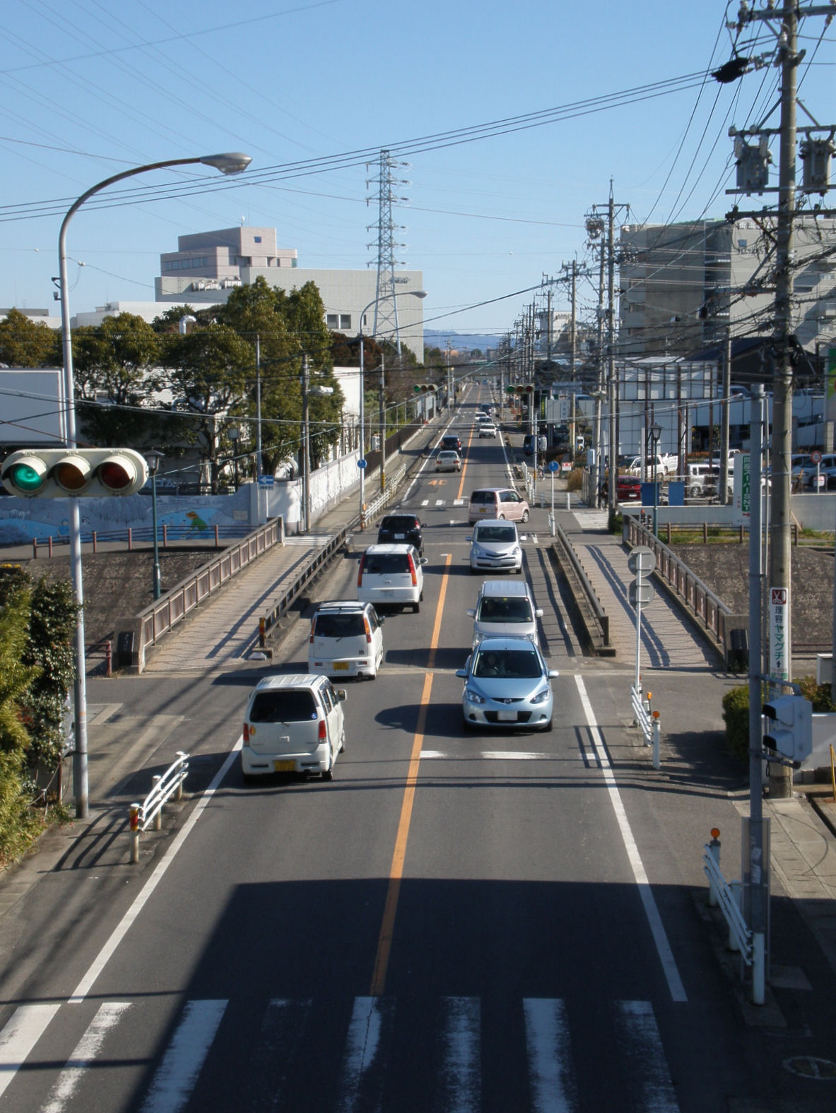 愛知県小牧市にある不発橋（うたずばし）